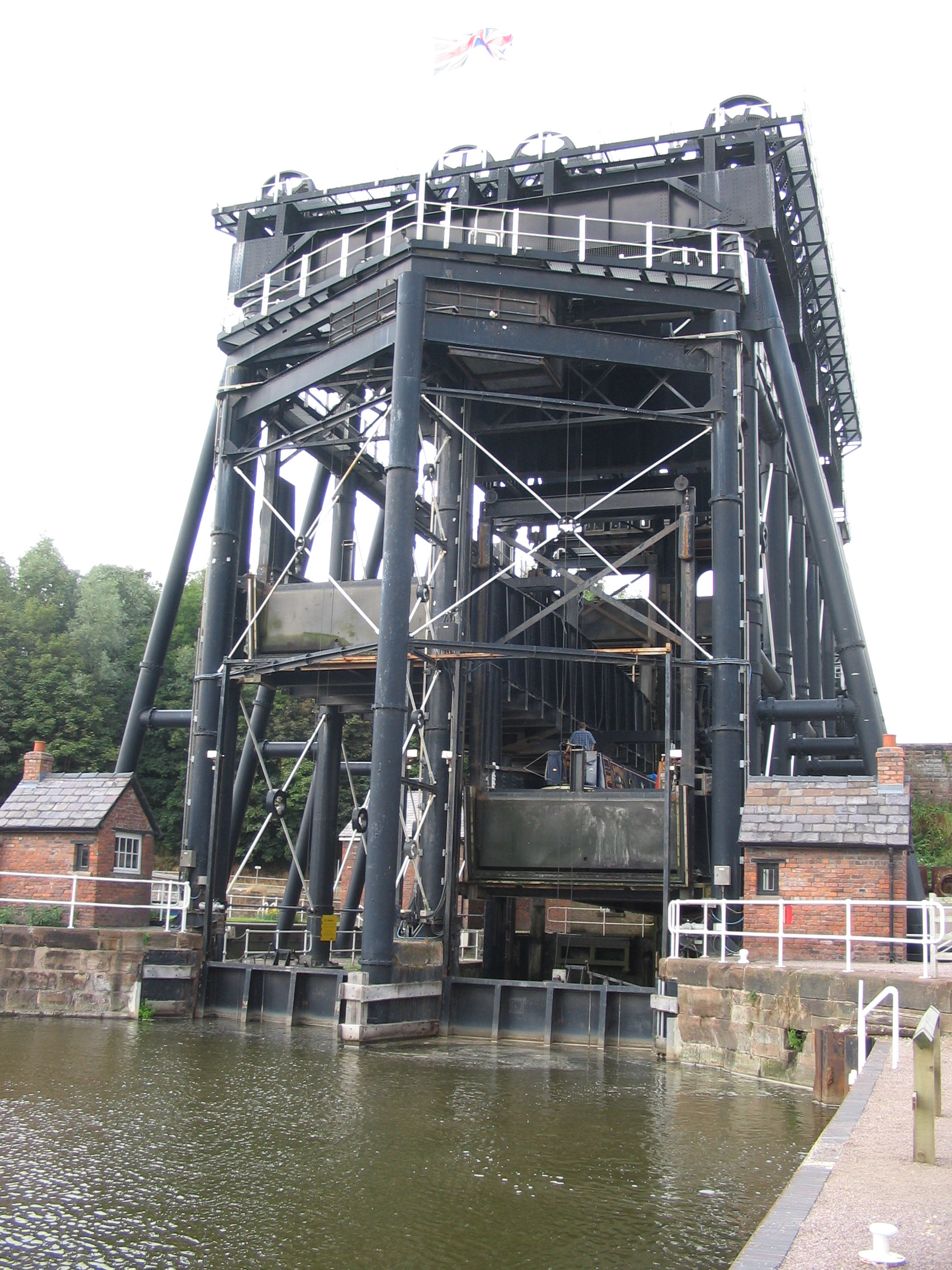 Scheepslift Anderton - eigen foto - augustus 2006